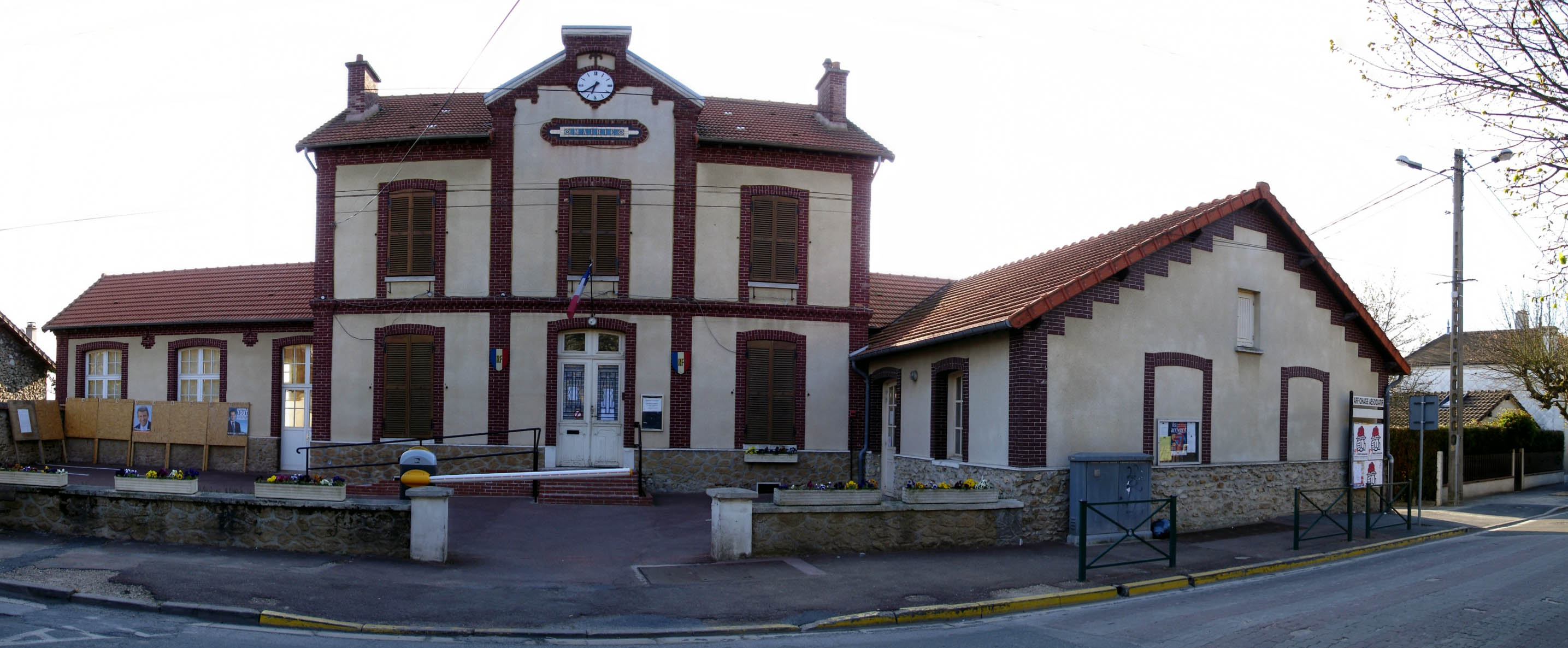 Mairie de Villevaudé (Seine-et-Marne), France